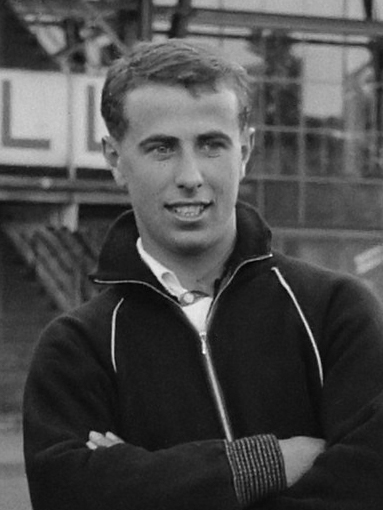 Eerste training van Feyenoord. Gerard 'Pummie' Bergholtz, Frans Bouwmeester en Coen Moulijn 8 augustus 1961